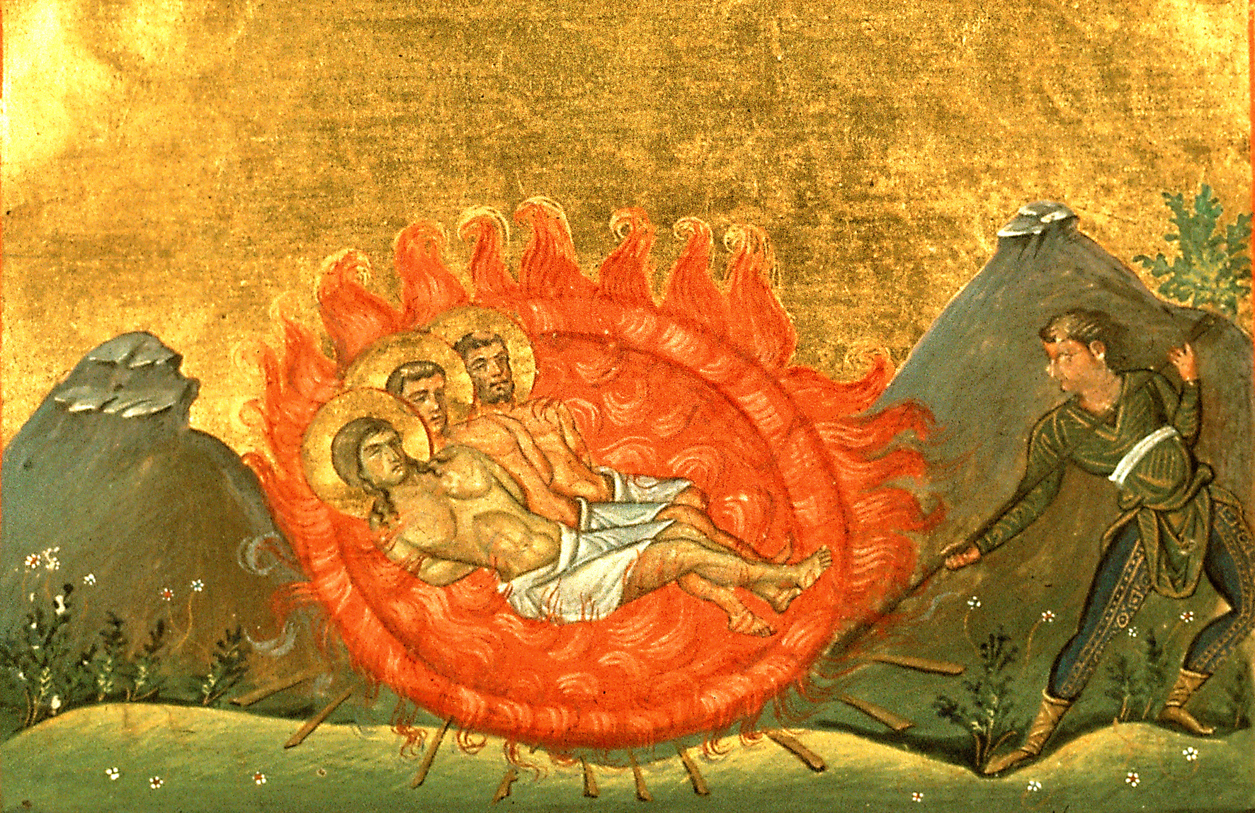 Мученики Евиласий, Фавста и Максим